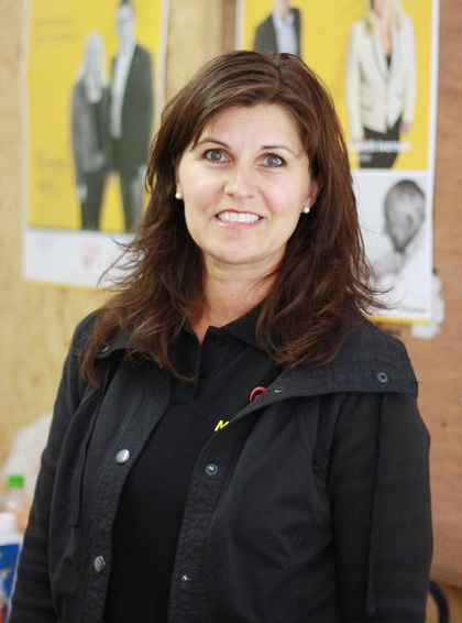 Bilde av Marita Moltu, bystyrekandidat for Bergen KrF, under kommunevalgkampen i 2011.